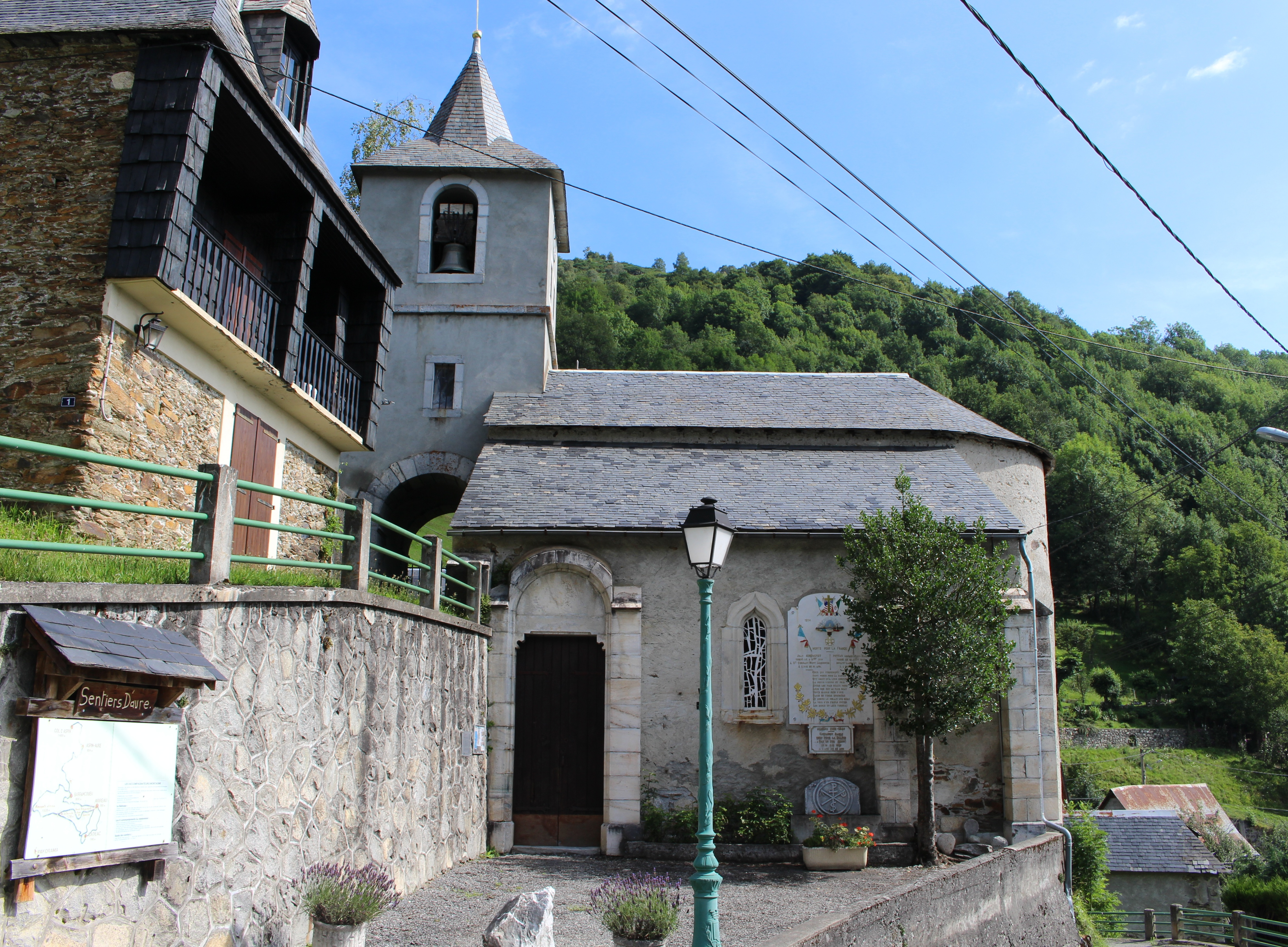 Église Saint-Martin de Barrancoueu (Hautes-Pyrénées)